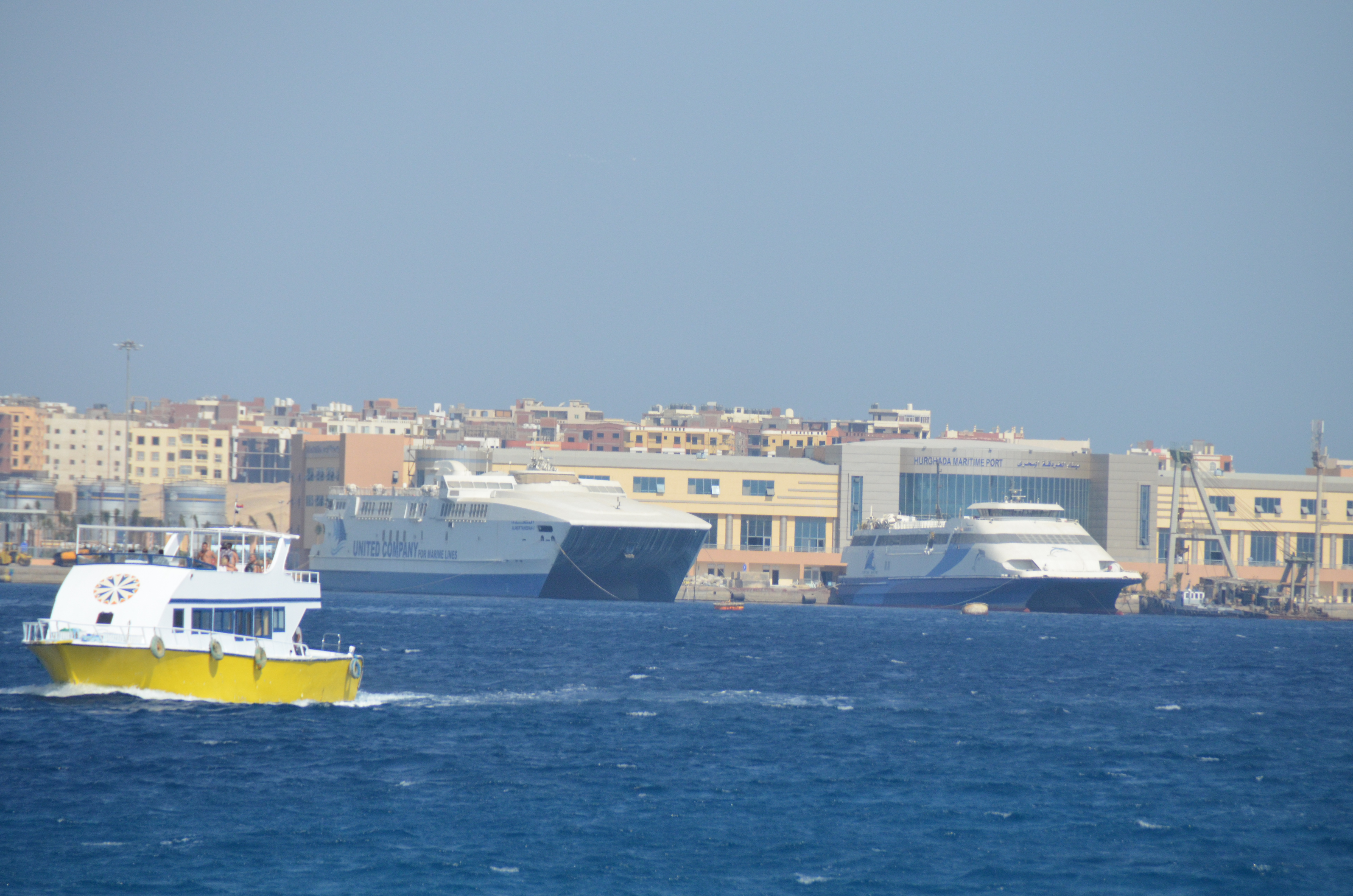 ساحل الغردقة